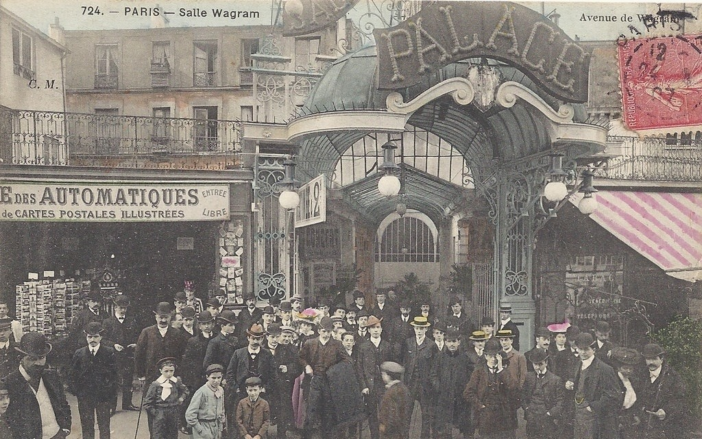 Avenue Wagram Paris entrée de la salle Wagram (vers 1900)